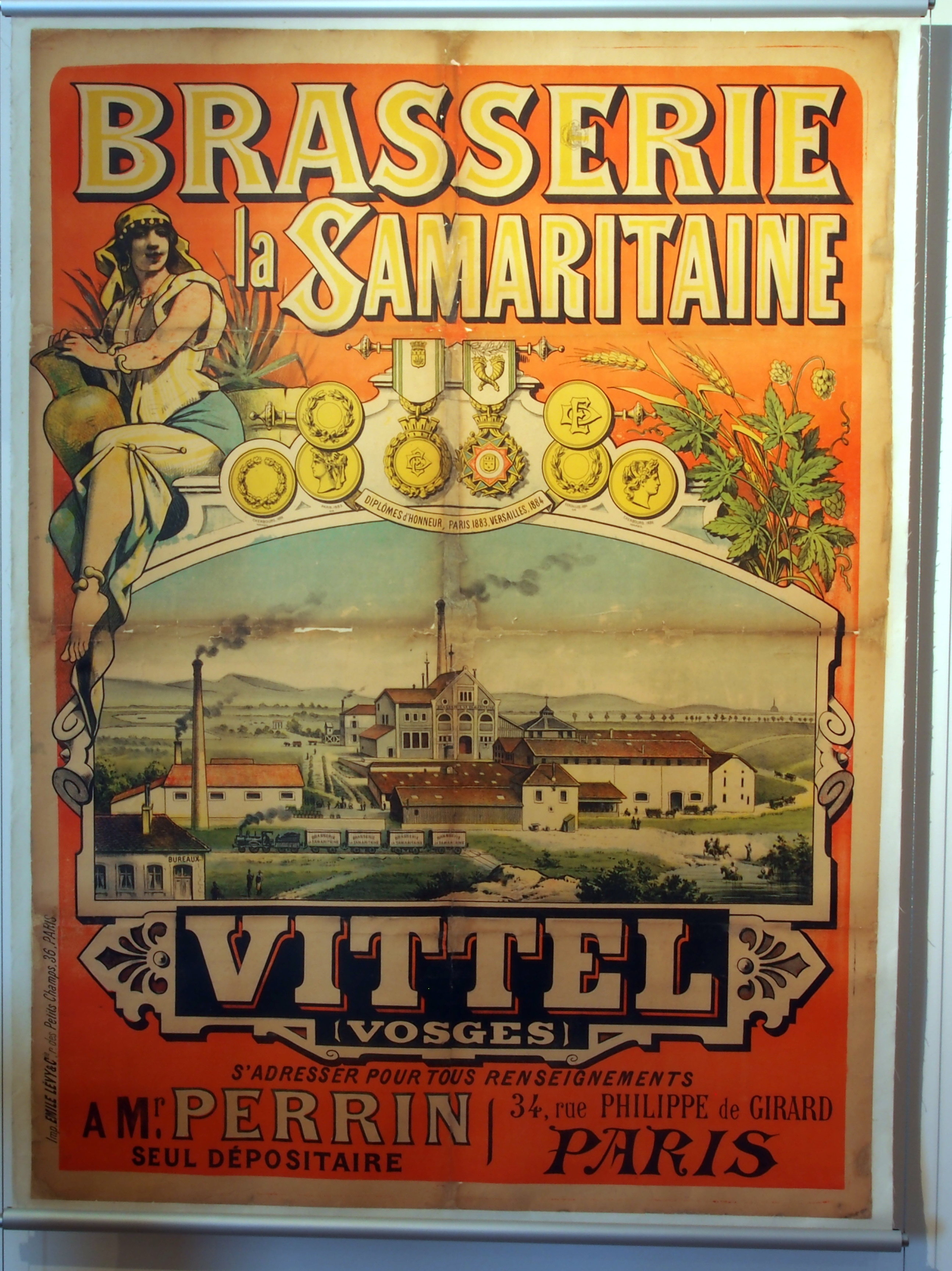 Brasserie la Samaritaine. Vittel